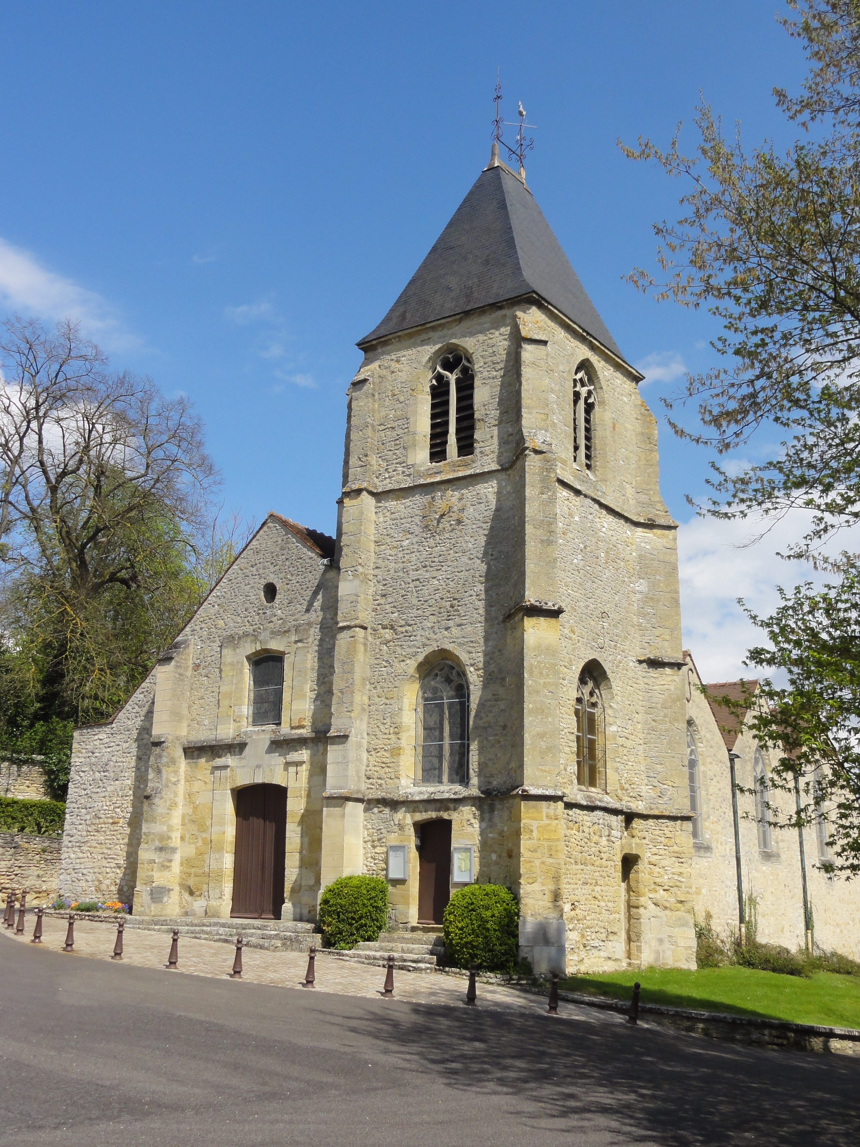 Église Saint-Martin d'Issou - voir titre.